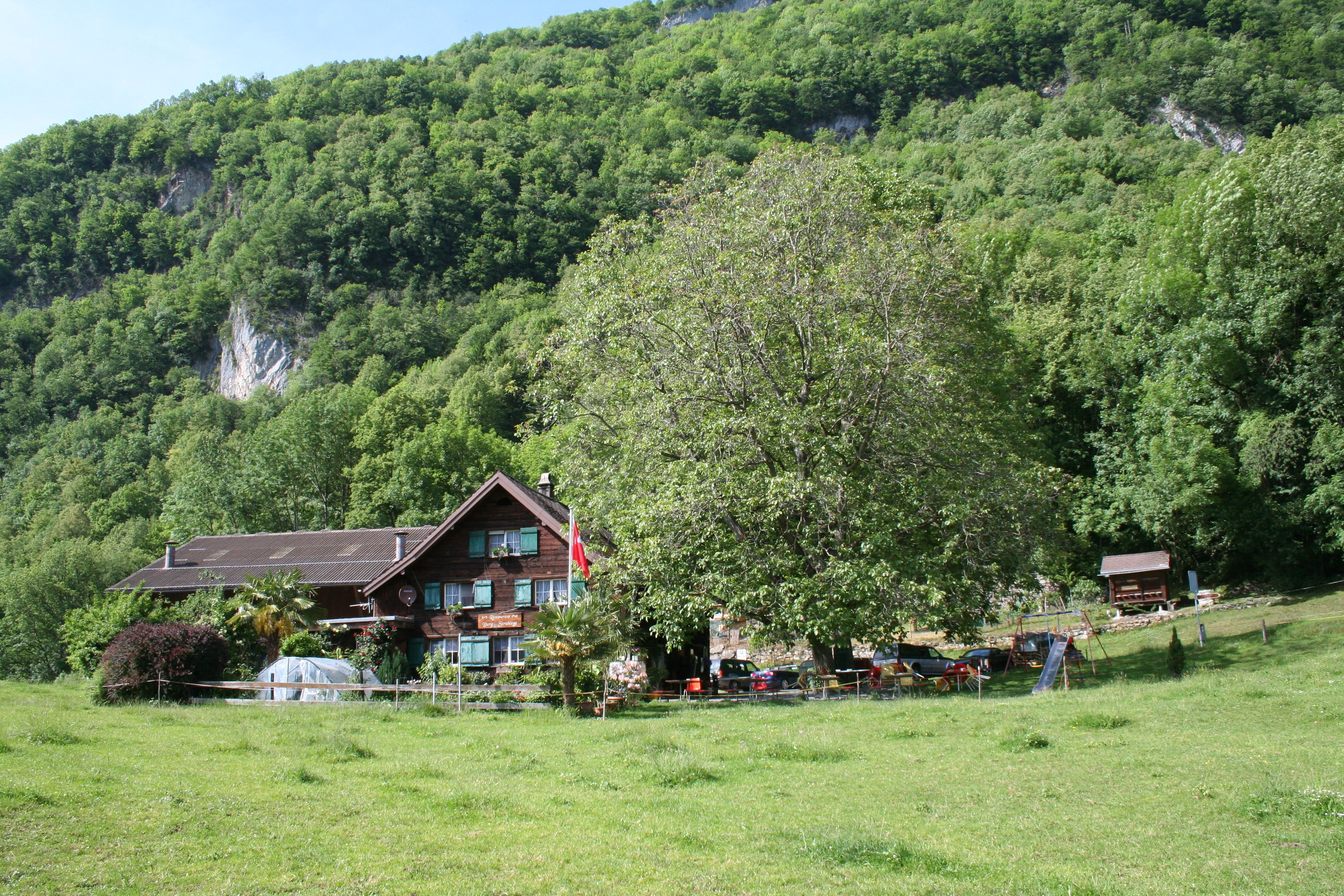 Restaurant Strahlegg in Betlis